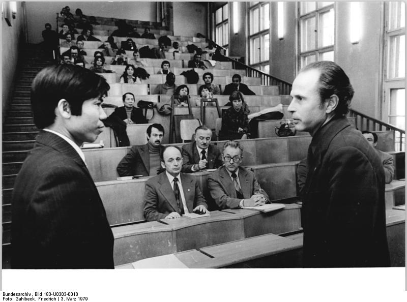 Leipzig, Universität, Hörsaal ADN-ZB Gahlbeck 3.3.79 Leipzig: Der vietnamesische Nguyen Huu Tri aus Ha-Dong promovierte am Leipziger Universitätsinstitut für tropische Landwirtschaft mit dem Prädikat "Cum Laude" zum Doktor der Agrarwissenschaften. Nach dem erfolgreich abgeschlossenen Promotionsverfahren nahm der 35jährige Wissenschaftler die Glückwünsche von Prof. Dr. Gunter Franke entgegen, der ihm zugleich versicherte, daß seine Kollegen in der DDR fest an der Seite des vietnamesischesn Volkes im Kampf gegen die chinesischen Aggressoren stehen. (siehe 11N)